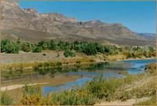 Draa river